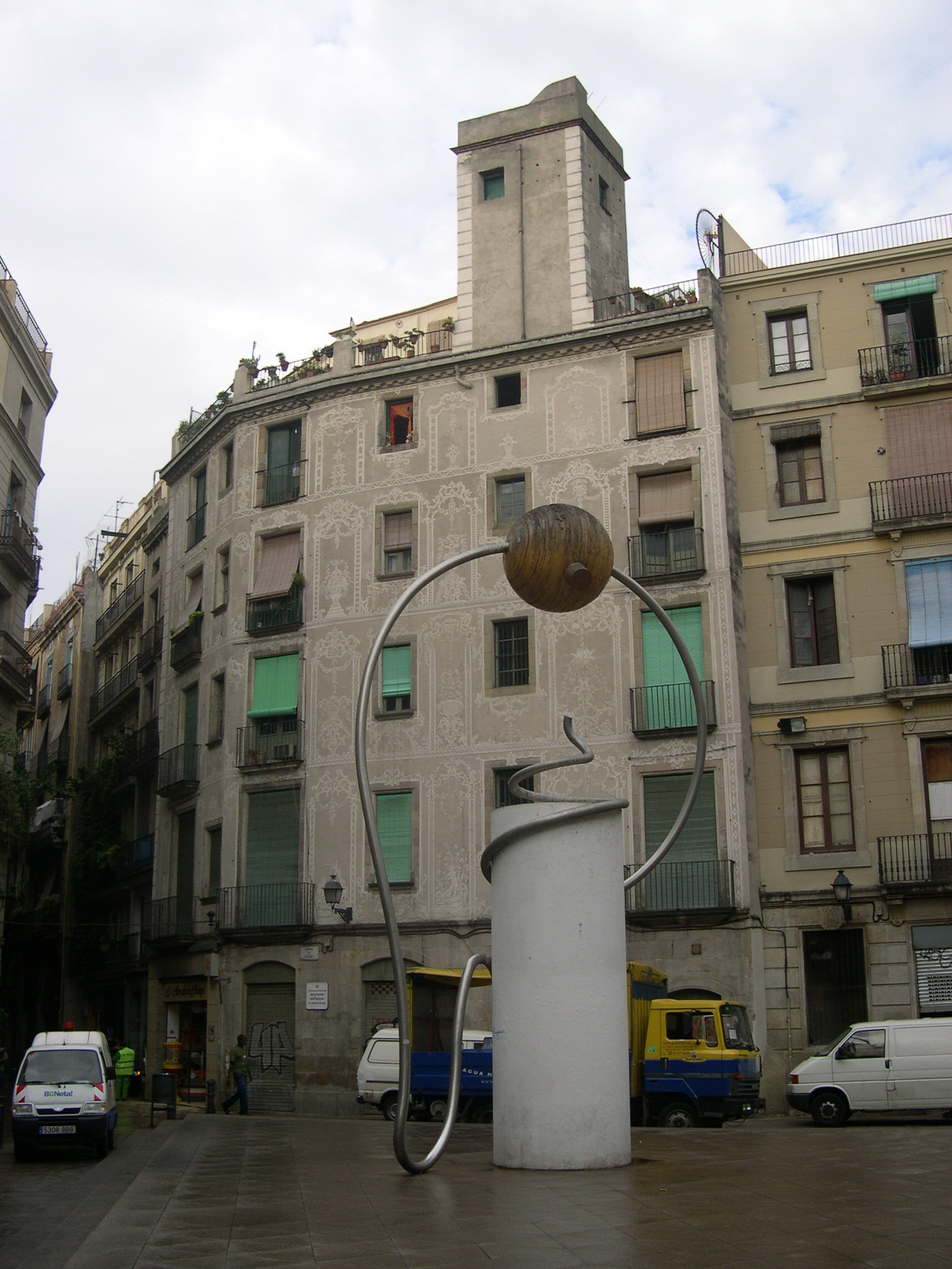 Edifici d'habitatges c. Escudellers, 59 (Barcelona)